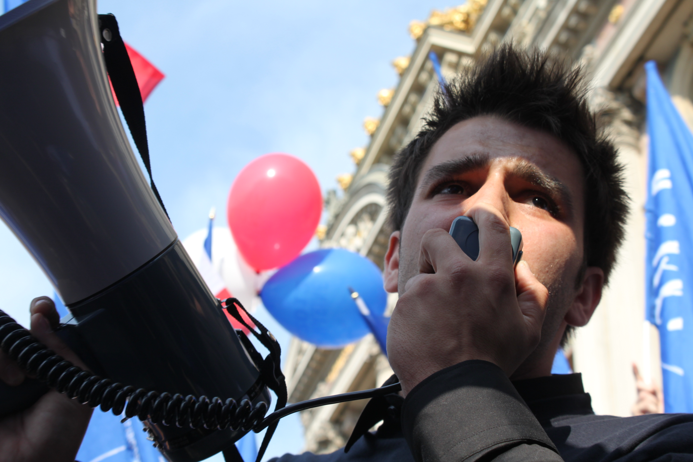 Photo d'Antoine Mellies, membre de la Direction nationale du FNJ, scandant au mégaphone les slogans du mouvement dans le cadre du traditionnel défilé du 1er-Mai, à Paris. Photo © 2011 G. Bouchet/Front national